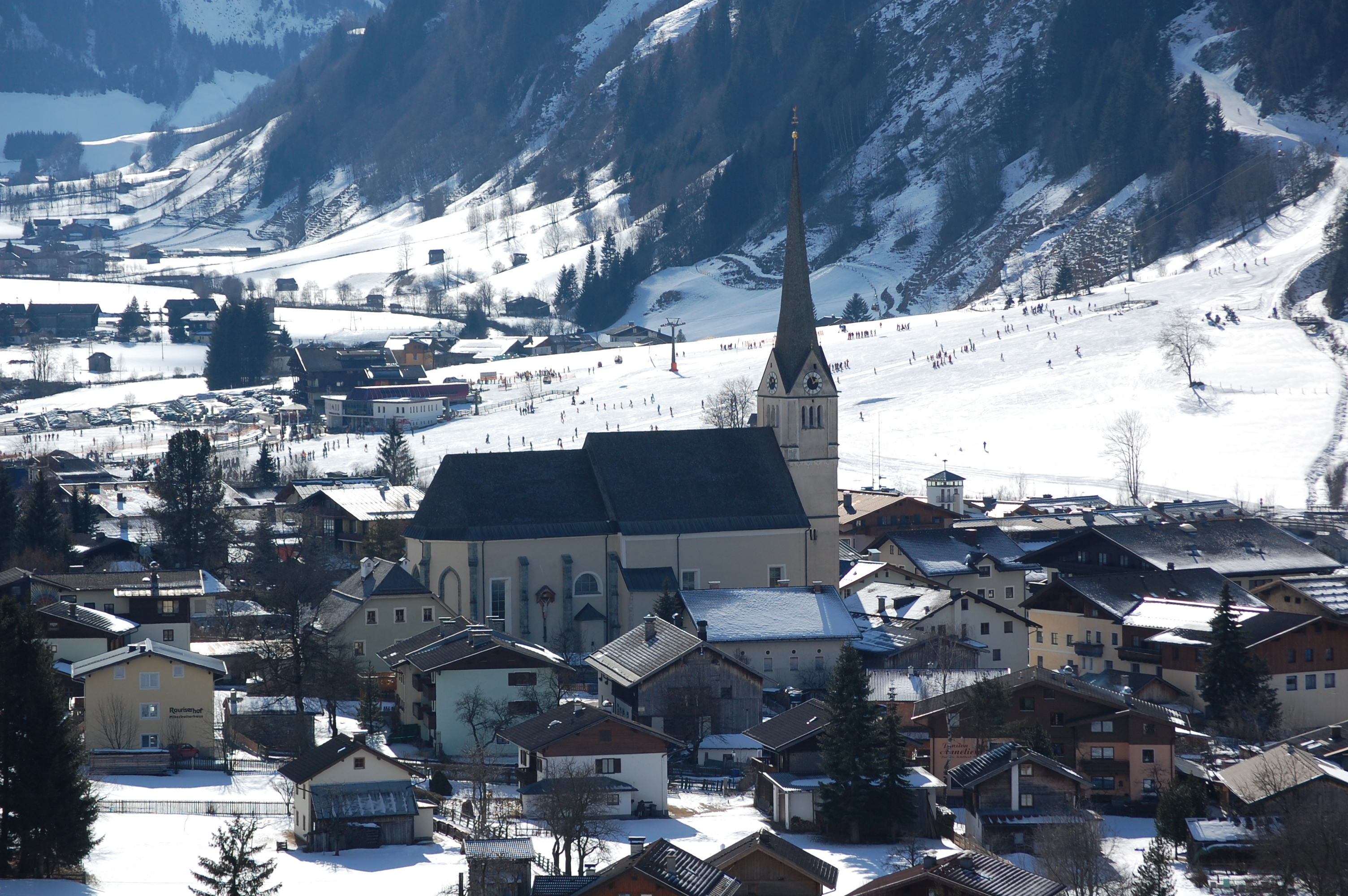 Blick auf Rauris mit der dominierenden Pfarrkirche hll. Jakob und Martin.